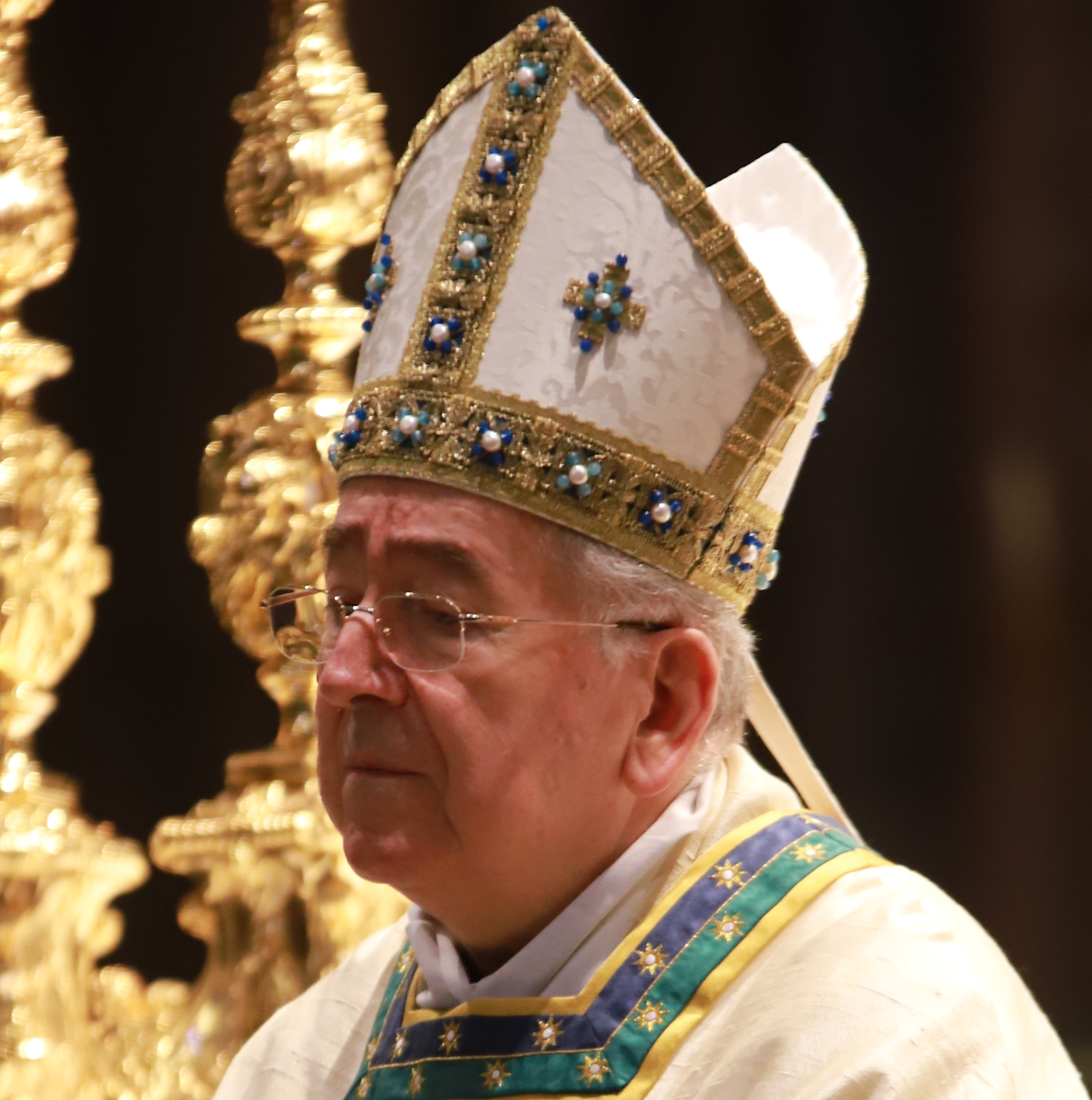 Rozpoczęcie pielgrzymki dziękczynnej archidiecezji krakowskiej do grobu Jana Pawła II w Rzymie, Bazylika Santa Maria Maggiore w Rzymie